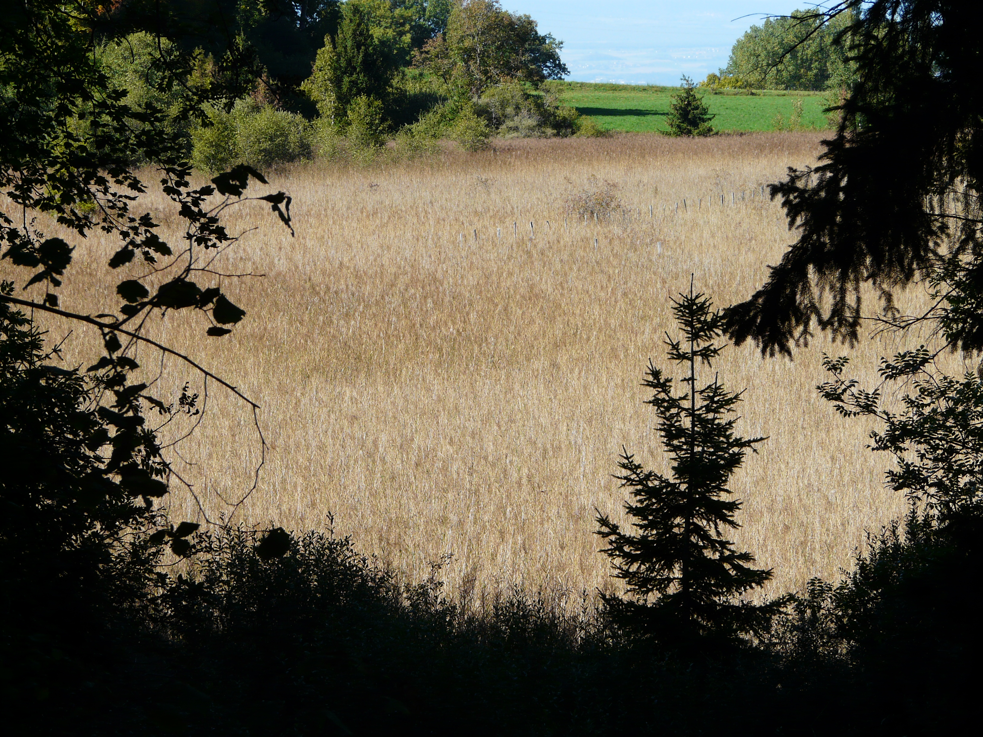 Vue partielle du marais de Praubert à Saint-Paul-en-Chablais (F 74), classé convention de Ramsar et Natura 2000 ZSC